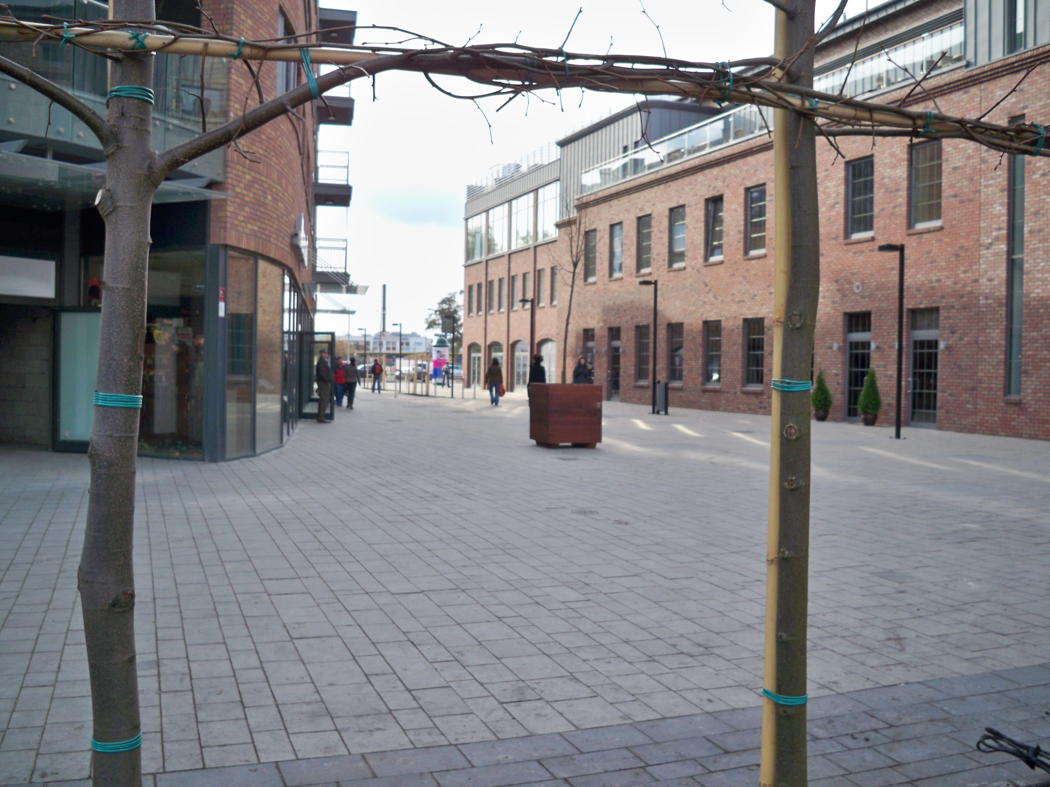 Wzorcownia Włocławek 2009 r.